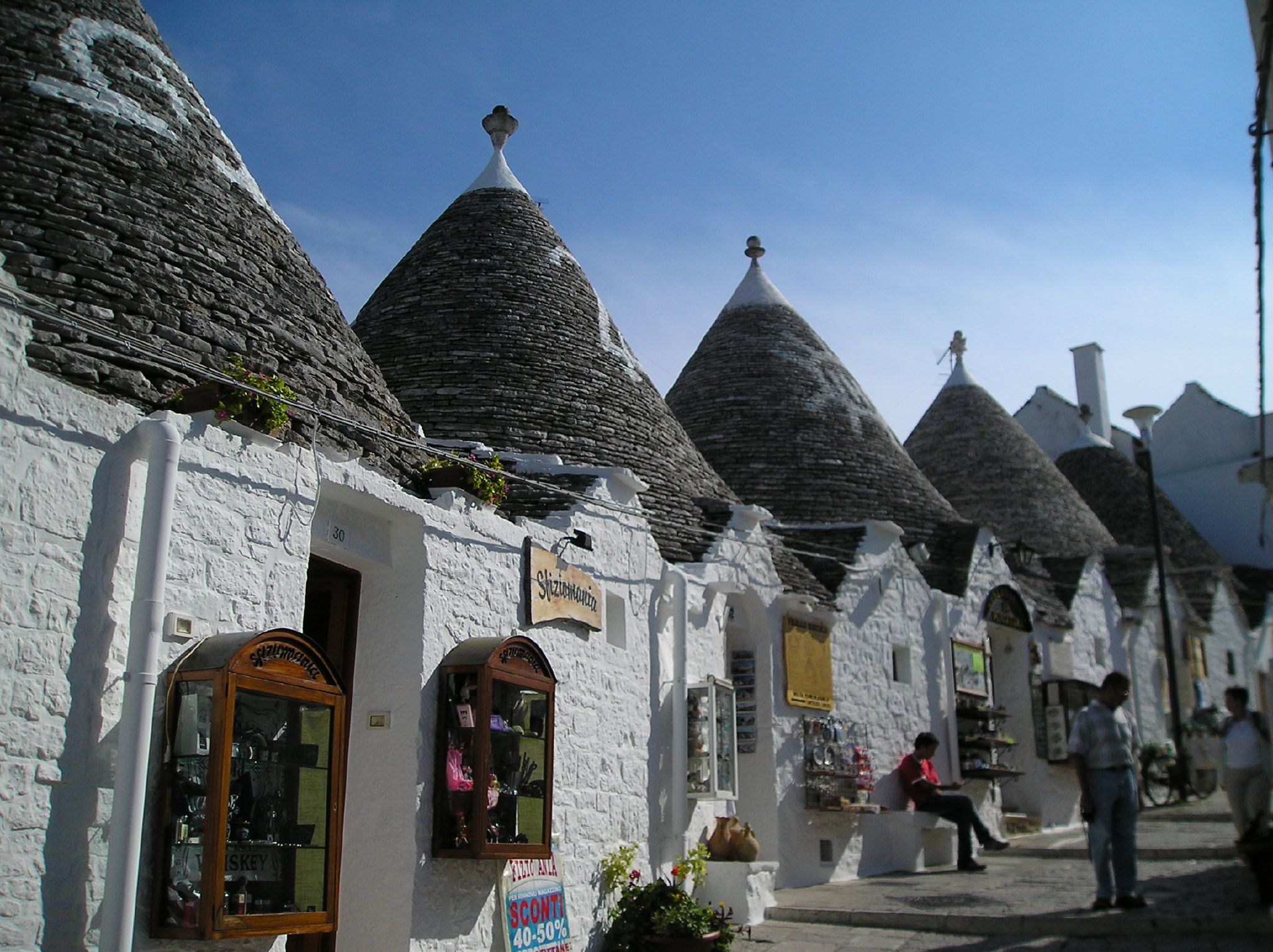 Alberobello